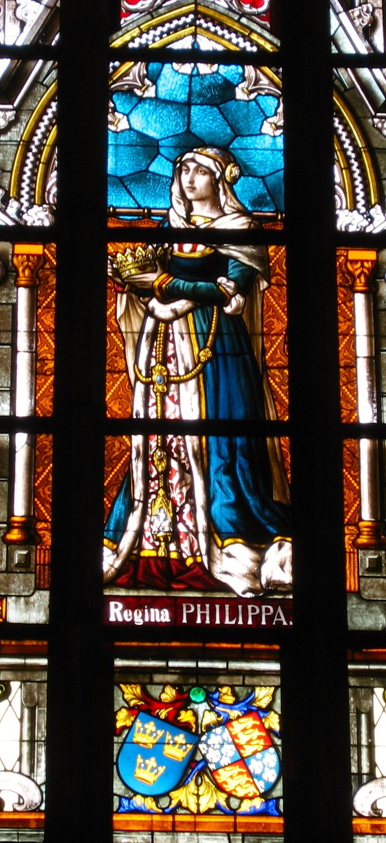 Philippa of England, Queen of Denmark, Norway and Sweden. Vadstena Monastery/Witraż z klasztoru w Vadstena z wyobrażeniem królowej Danii, Norwegii i Szwecji Filipy Lancaster